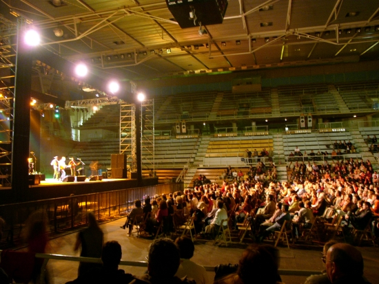 Uesca's municipal sports palace during Periferias 2007 festival